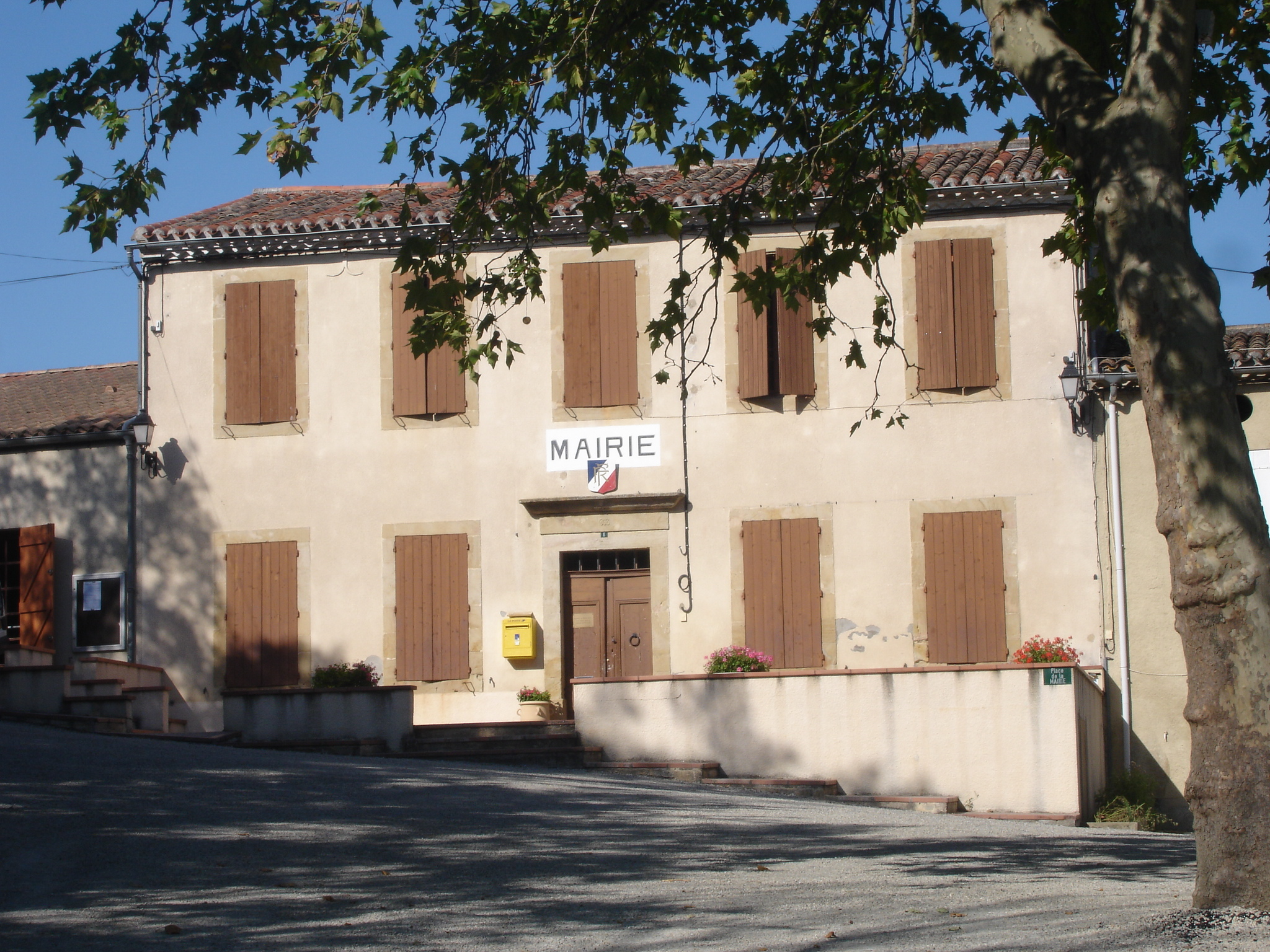 France, aude (11), Montferrand, mairie